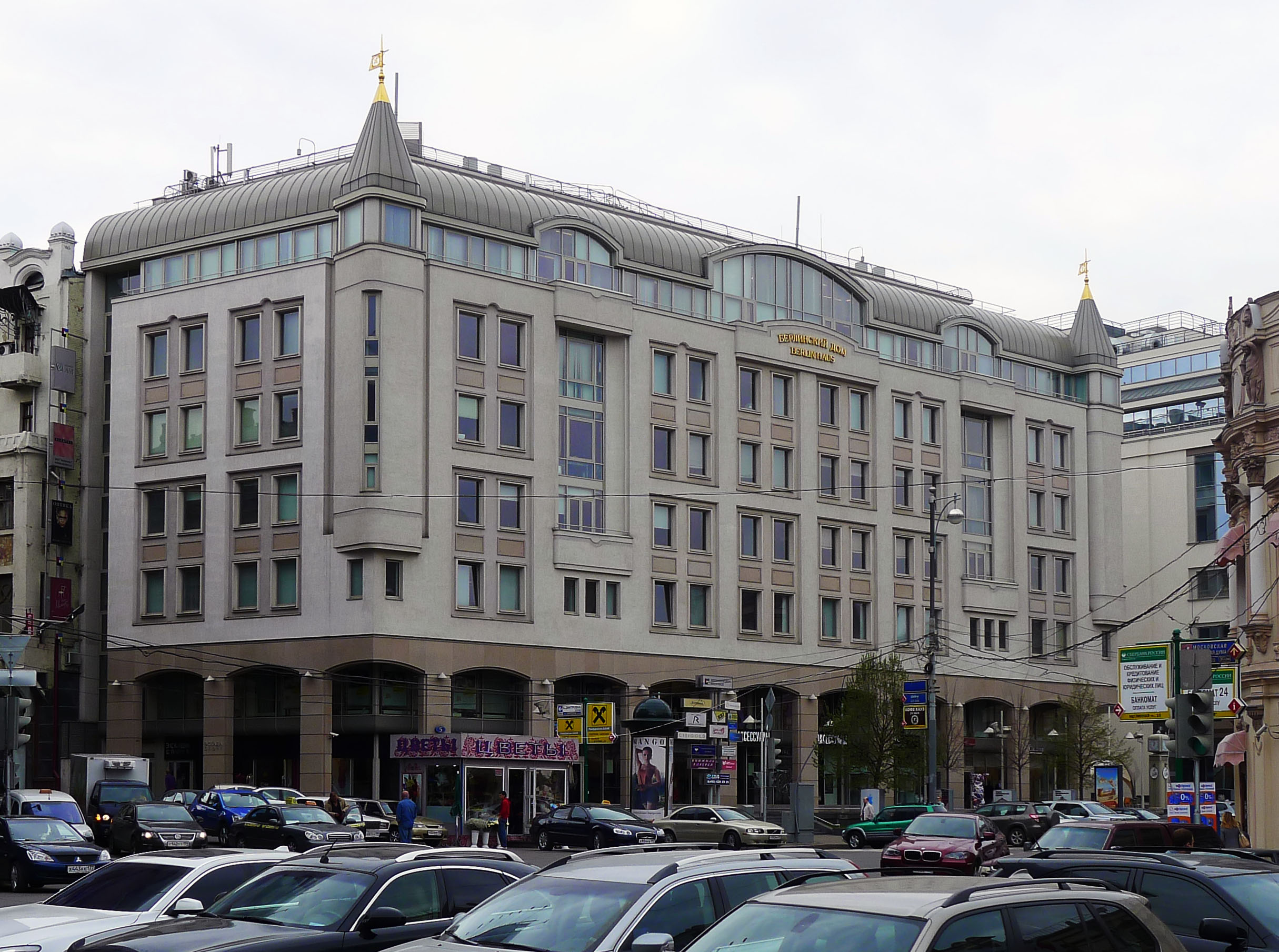 Берлинский дом в Москве, на углу улиц Петровка и Кузнецкий Мост. Архитектор Бартошевич И.К.